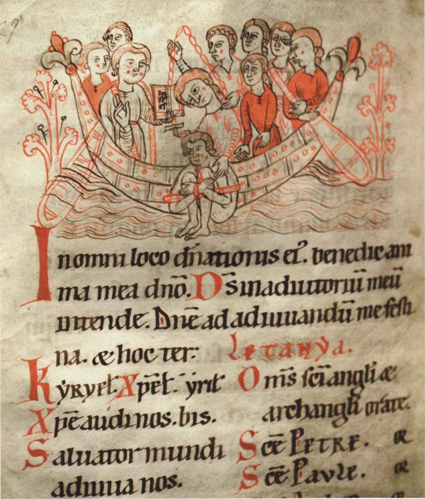 Wasserprobe. Bei dieser Form des Ordals wurde der Kandidat gebunden im Wasser versenkt, schwamm er obenauf, galt dies als Schuldbeweis. Ausschnitt aus einer Seite des Rituale in der Stiftsbibliothek Lambach. Cml LXXIII. f. 64v, 72r (Ende des 12. Jahrhunderts)